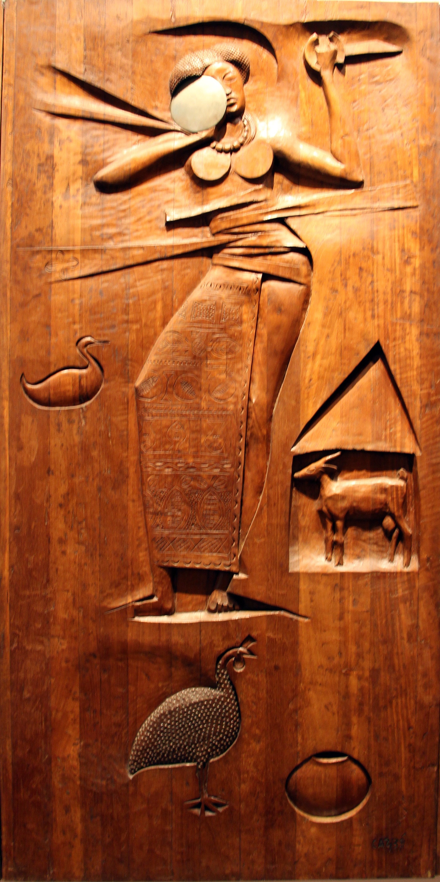 Candomblé nel Museu Afro-Brasileiro, Salvador